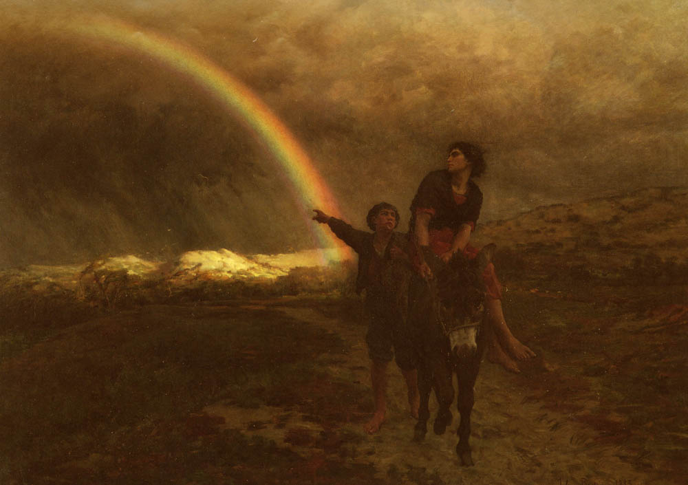 L'Arc-en-ciel The Rainbow